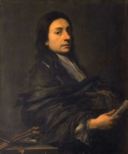 Autorretrato de Anton Domenico Gabbiani